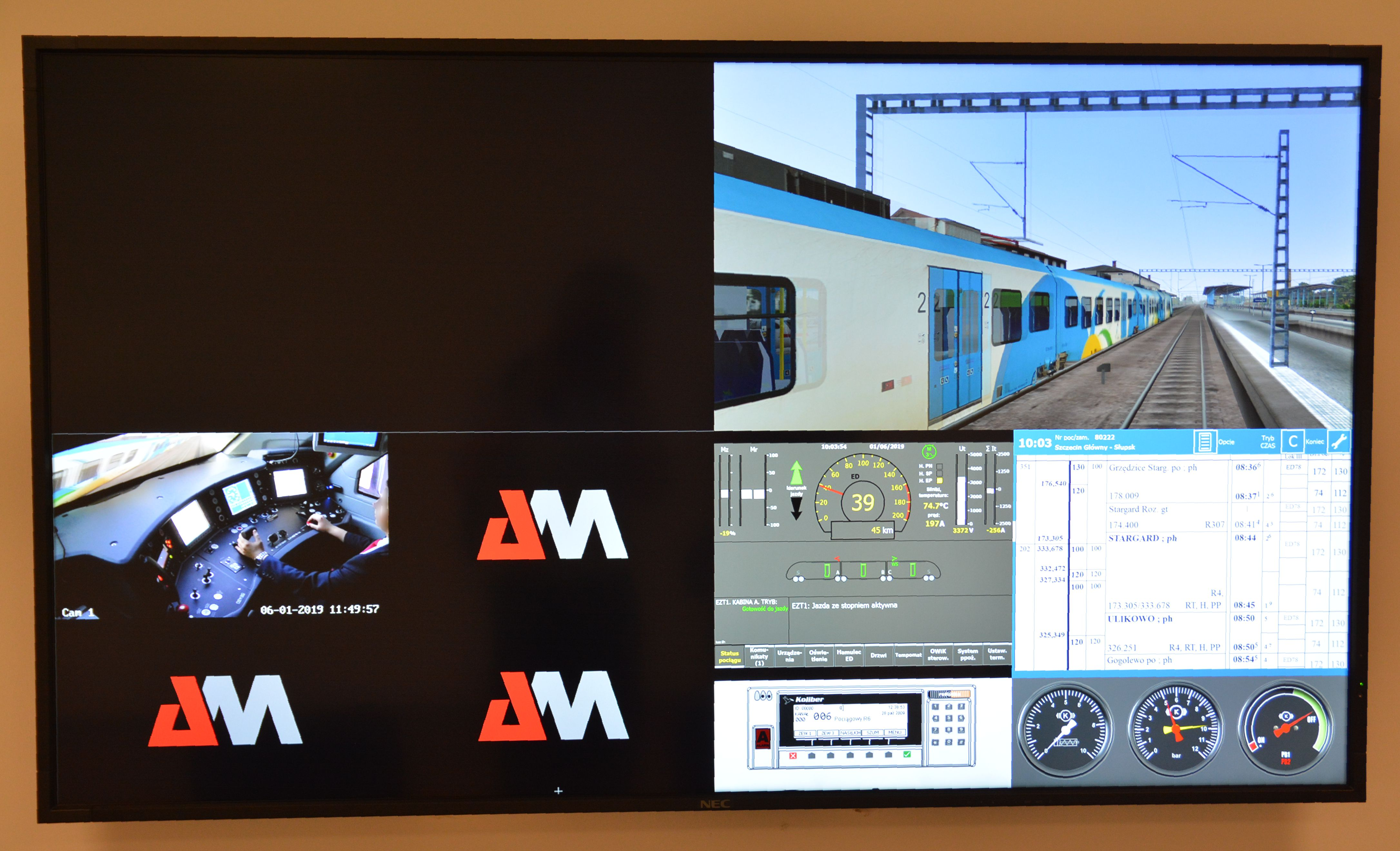 Symulator kierowania pociągiem w Centrum Szkolenia Maszynistów - Szczecin Wzgórze Hetmańskie